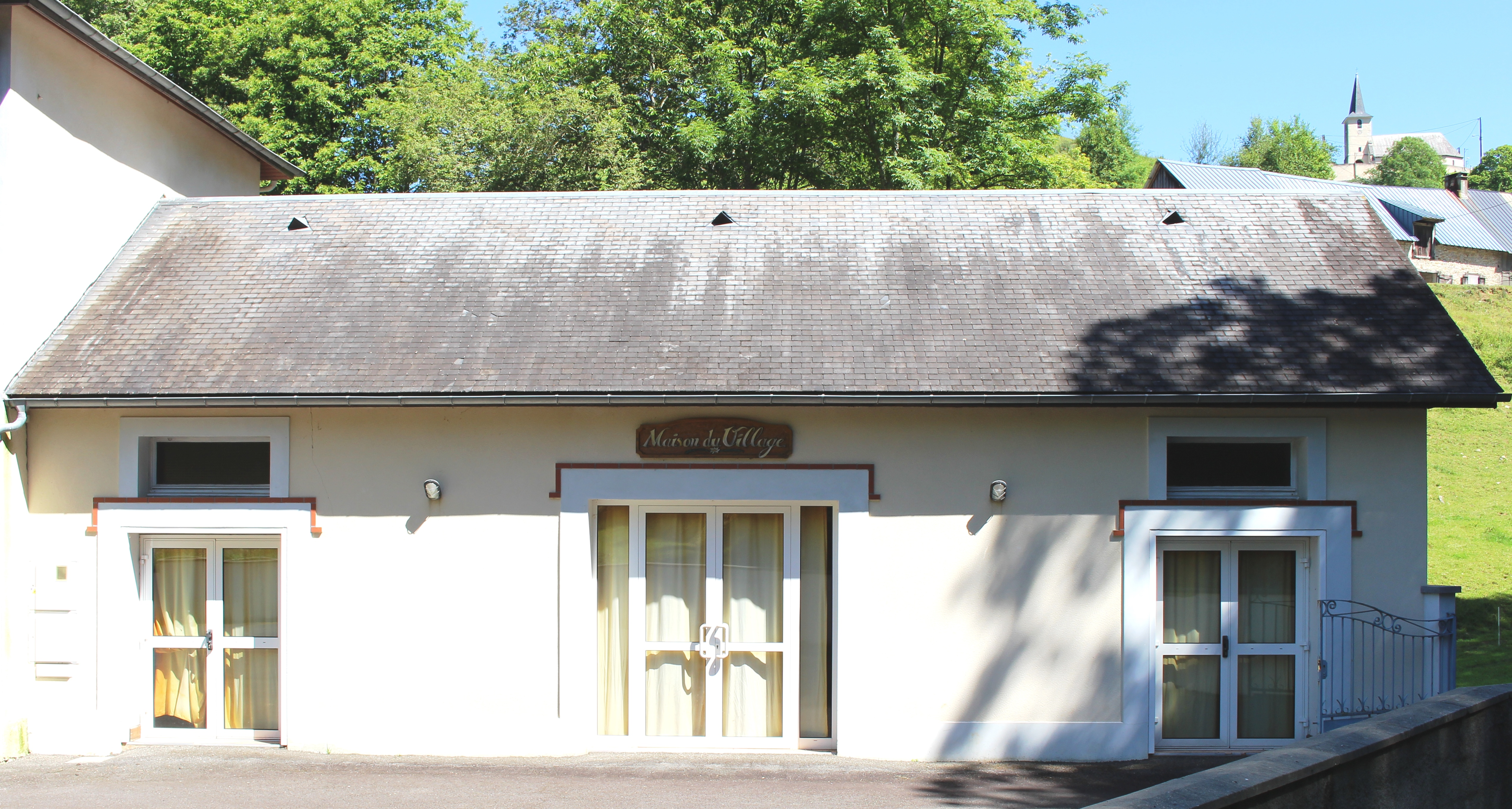 Salle des fêtes de Lies (Hautes-Pyrénées)